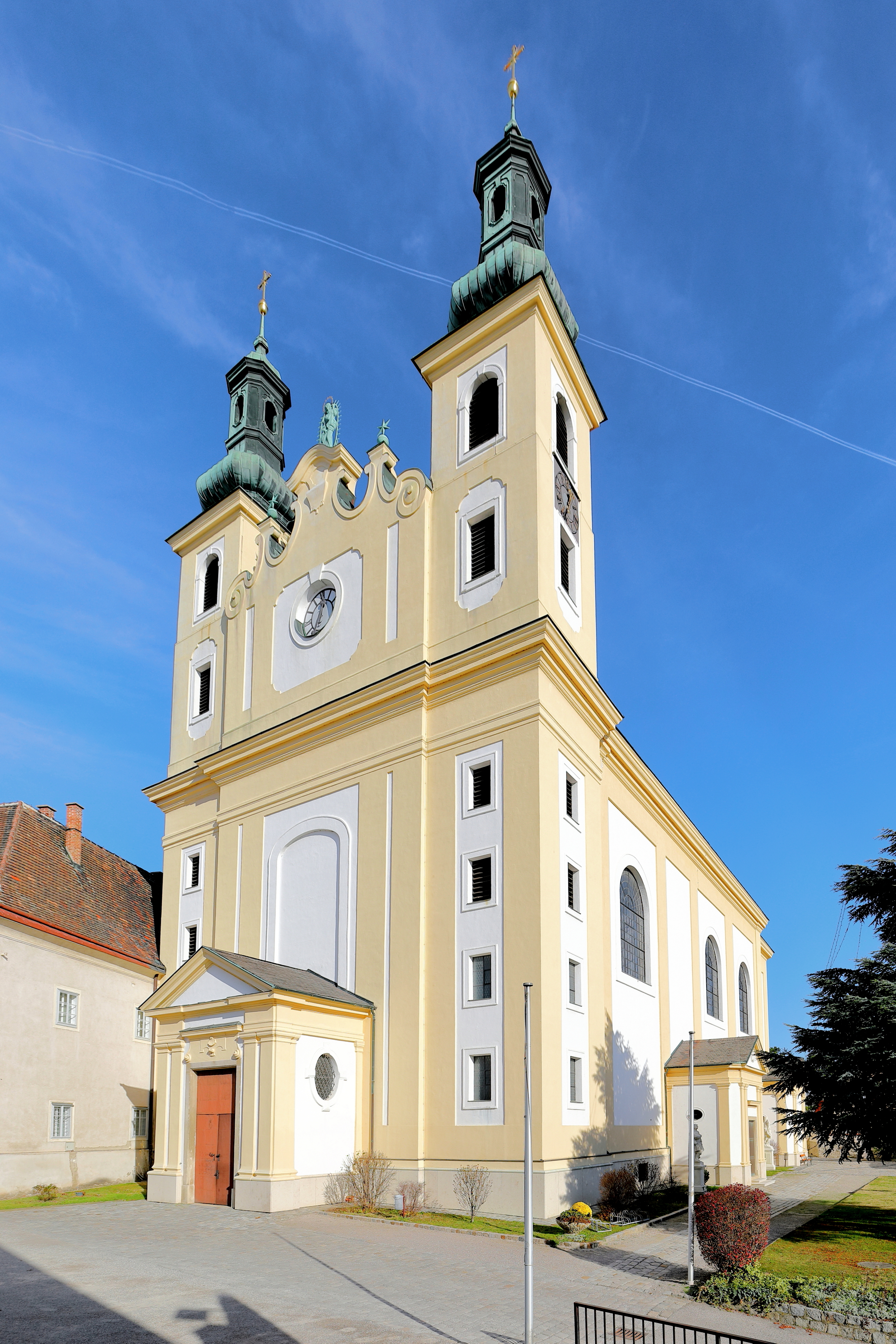 Südwestansicht der Pfarr- und Wallfahrtskirche zur Schmerzhaften Mutter Gottes in der niederösterreichischen Gemeinde Maria-Lanzendorf.Die Kirche mit einer Doppelturmfassade wurde unter Einbeziehung der älteren Gnadenkapelle (gotischer Chor der Vorgängerkirche) von 1699 bis 1703 durch den Baumeister Franz Jänggl errichtet. Von 1723 bis 1731 wurde die Kirche nach Osten hin um einen von einer mächtigen Kuppel gekrönten Chorraum, erweitert, wodurch die Gnadenkapelle jetzt innerhalb des Langhauses platziert ist.